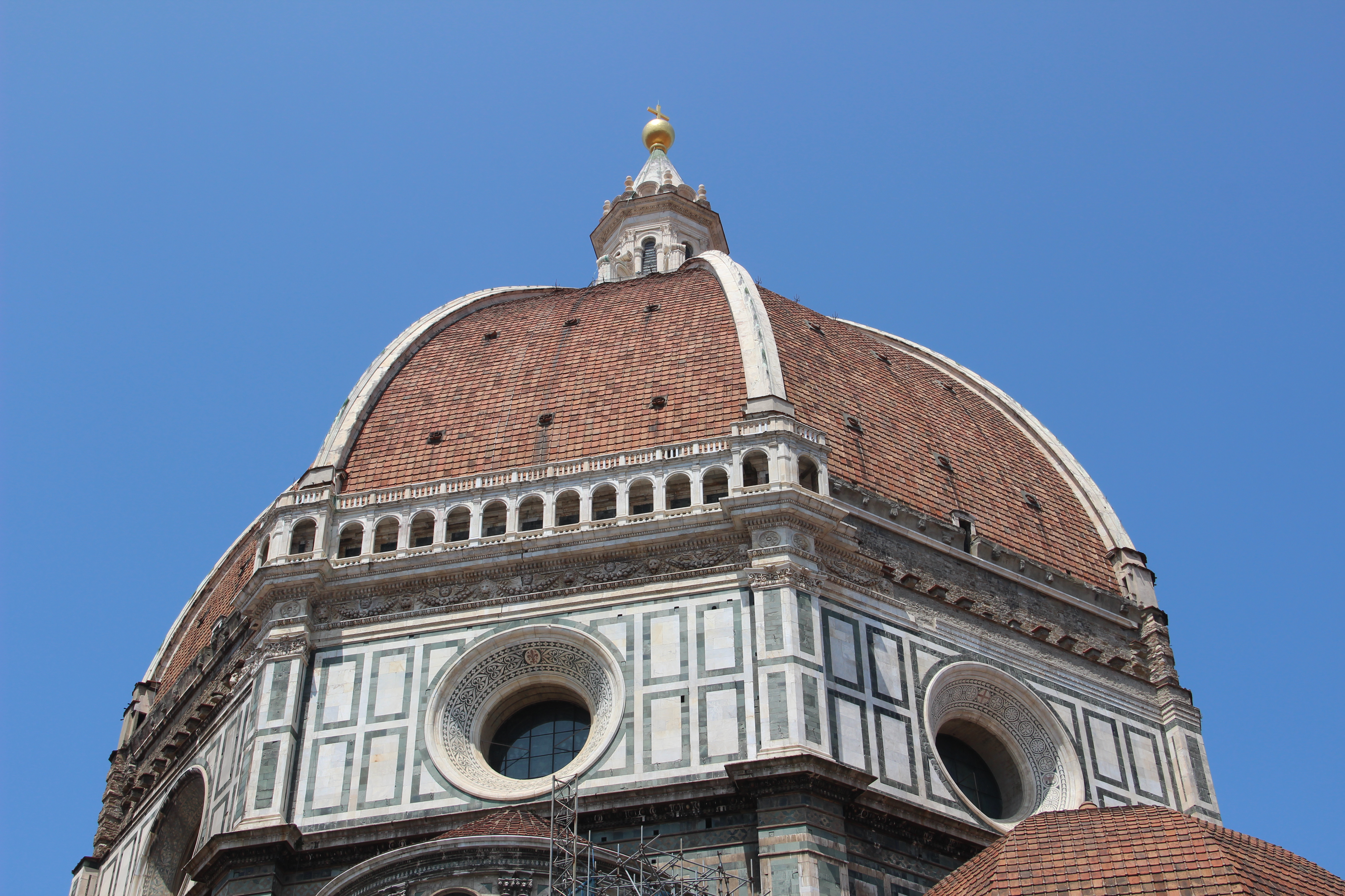 Cattedrale di Santa Maria del Fiore